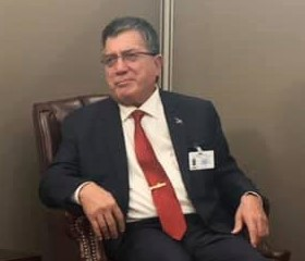 John M. Silk, Außenminister der Marshallinseln